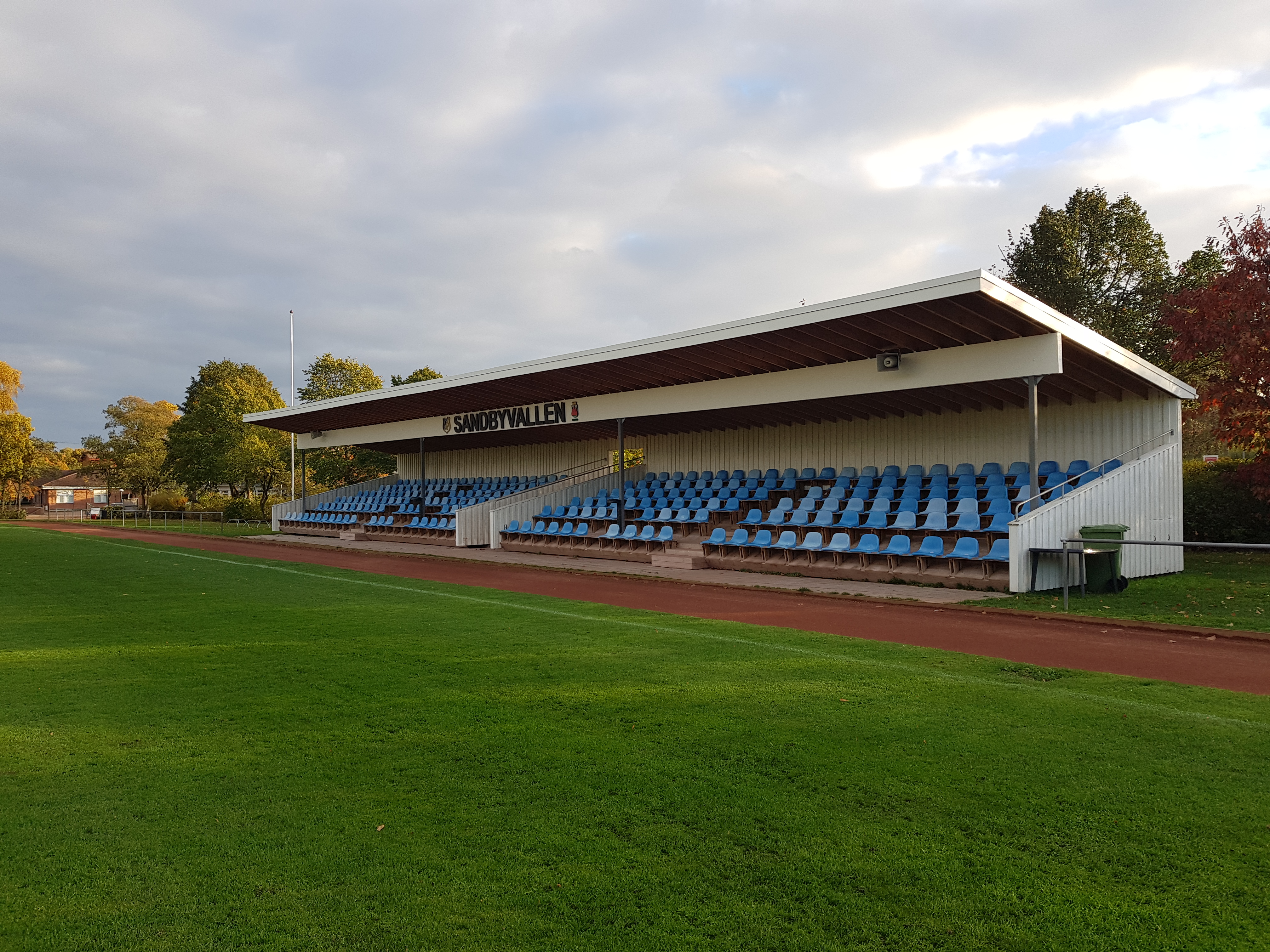 Sandbyvallen, hemmaplan för Södra Sandby IF med läktare.